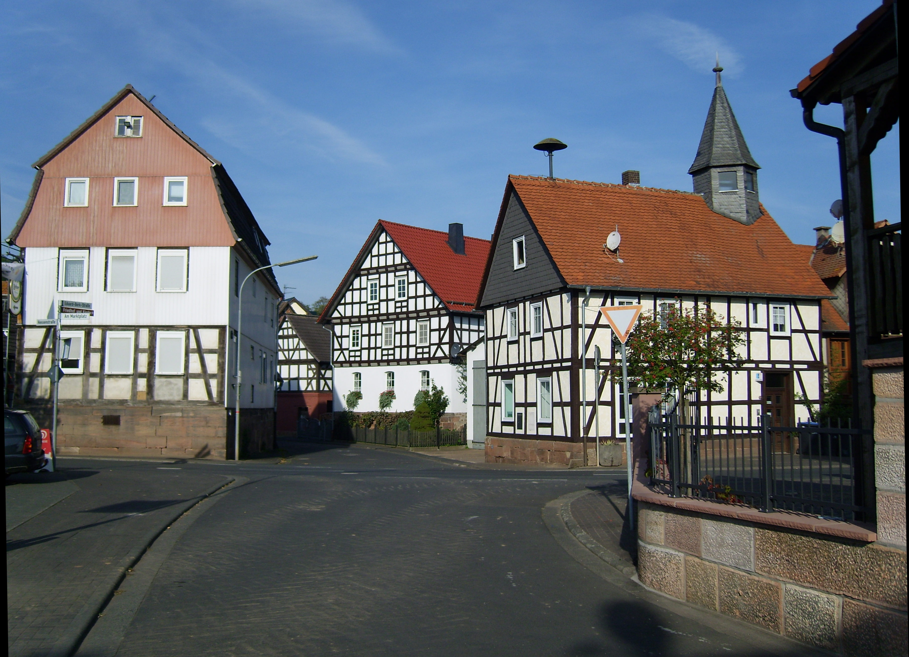 Häuser im Zentrum von Wittelsberg:Hessenstr. 1, Eduard-Bork-Str. 1 und Am Markt 2 (Raiffeisenbank)